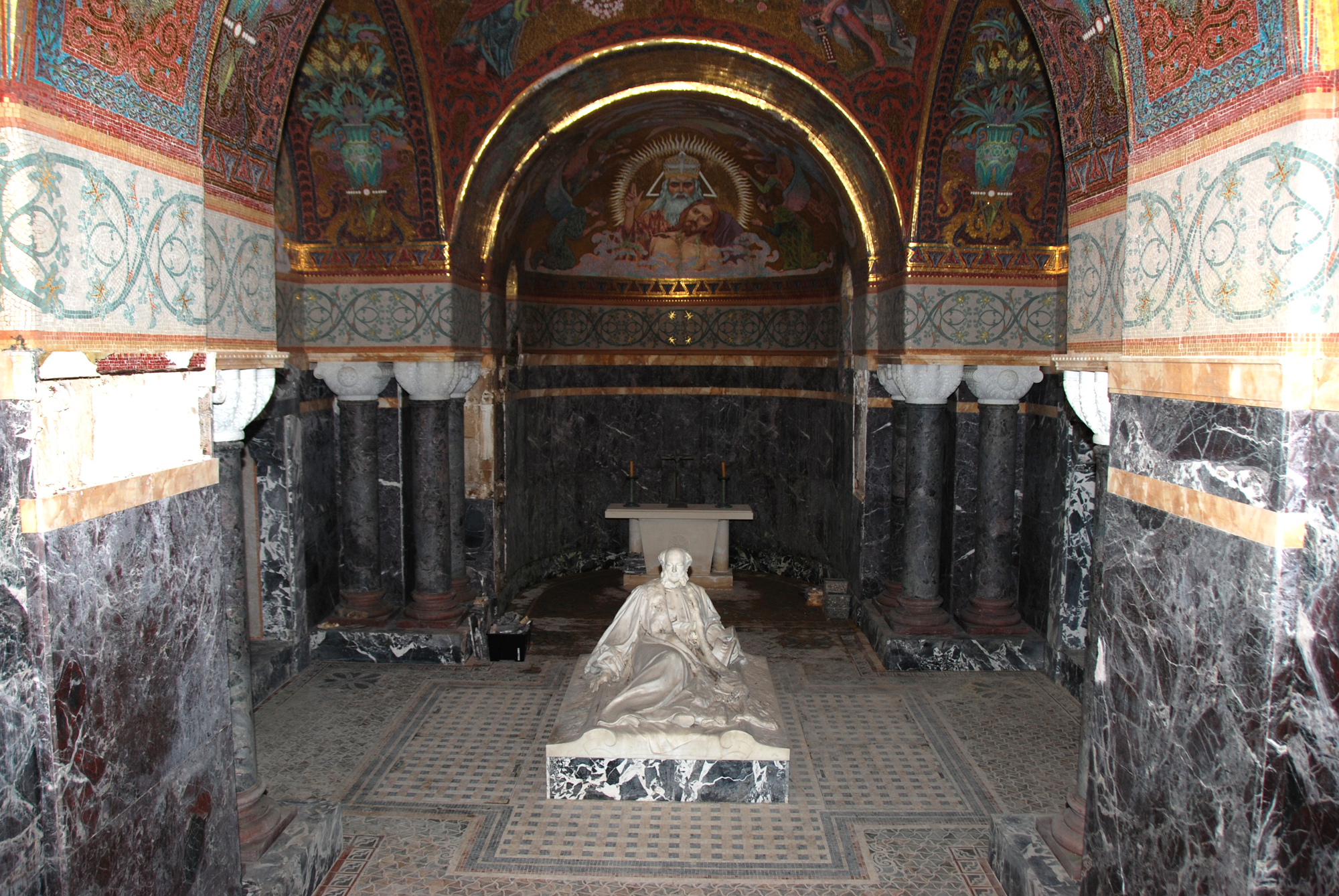 Bourgogne mausoleum - View of the entire